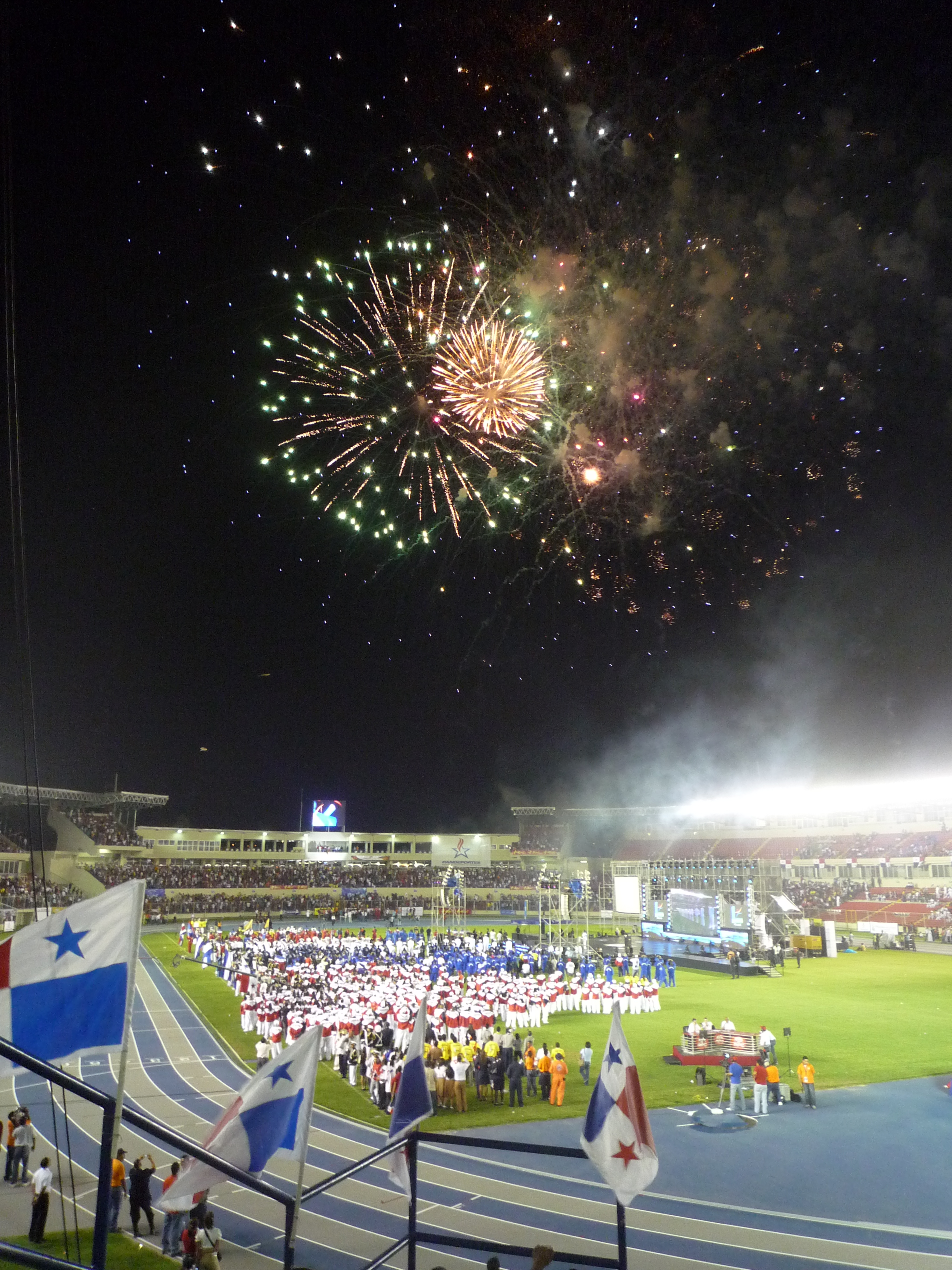 Fuegos artificiles en la inauguración de los novenos juegos centroamericanos en el Estadio Rommel Fernández en el 2010.